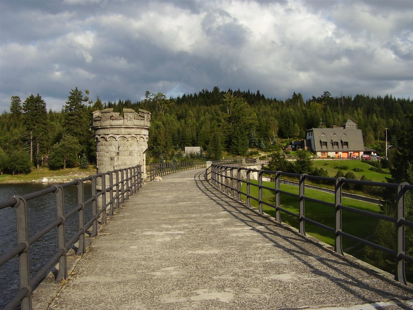 Hráz přehrady Bedřichov v Libereckém kraji